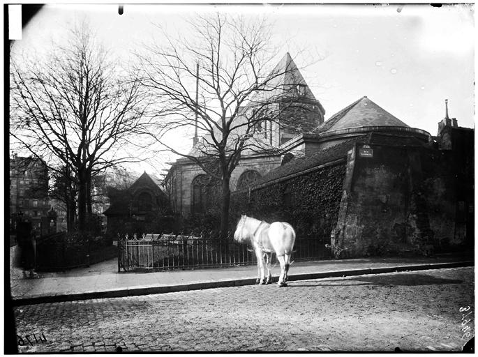 Façade est, abside